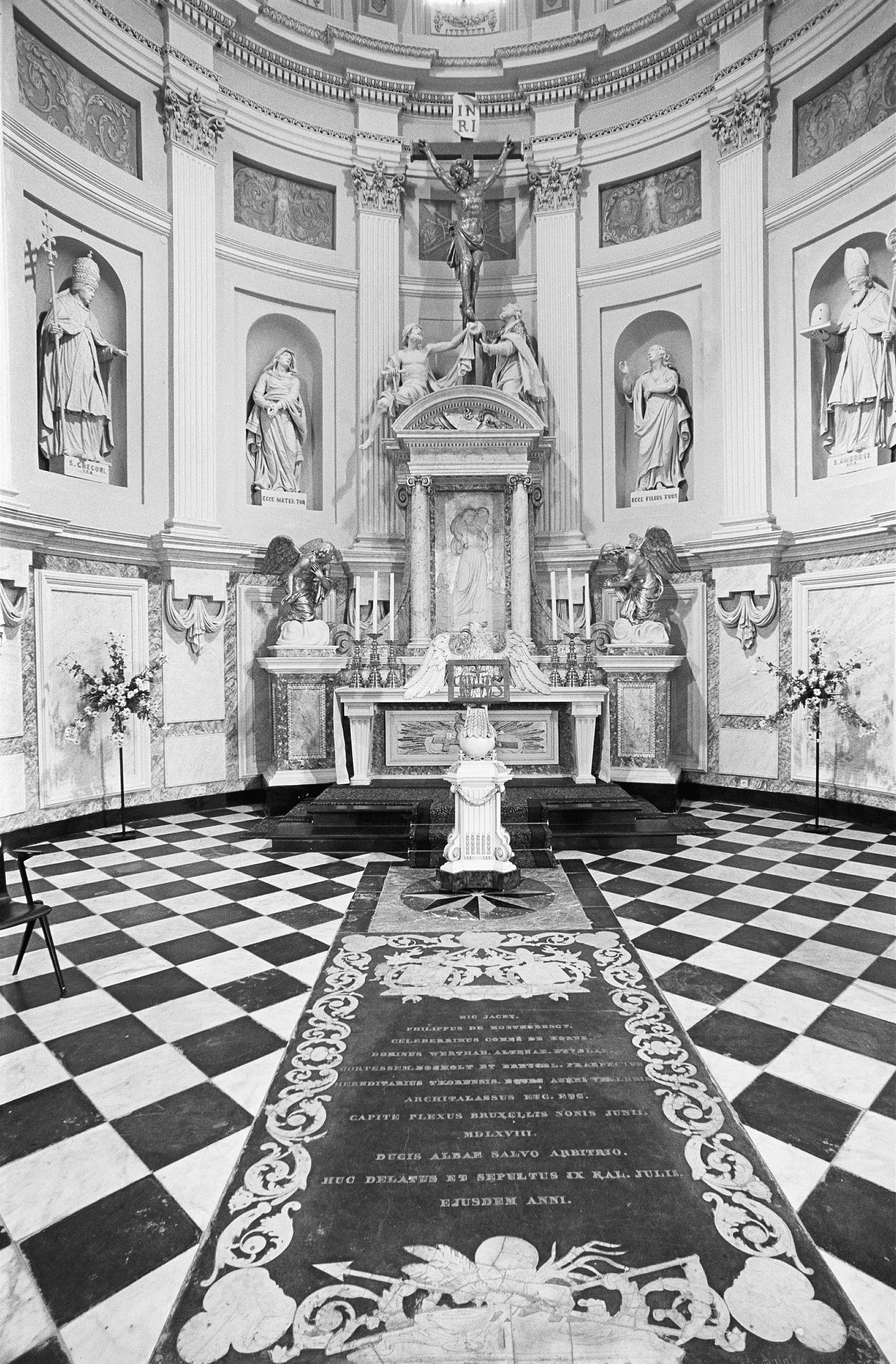 Sint Martinus: interieur altaar